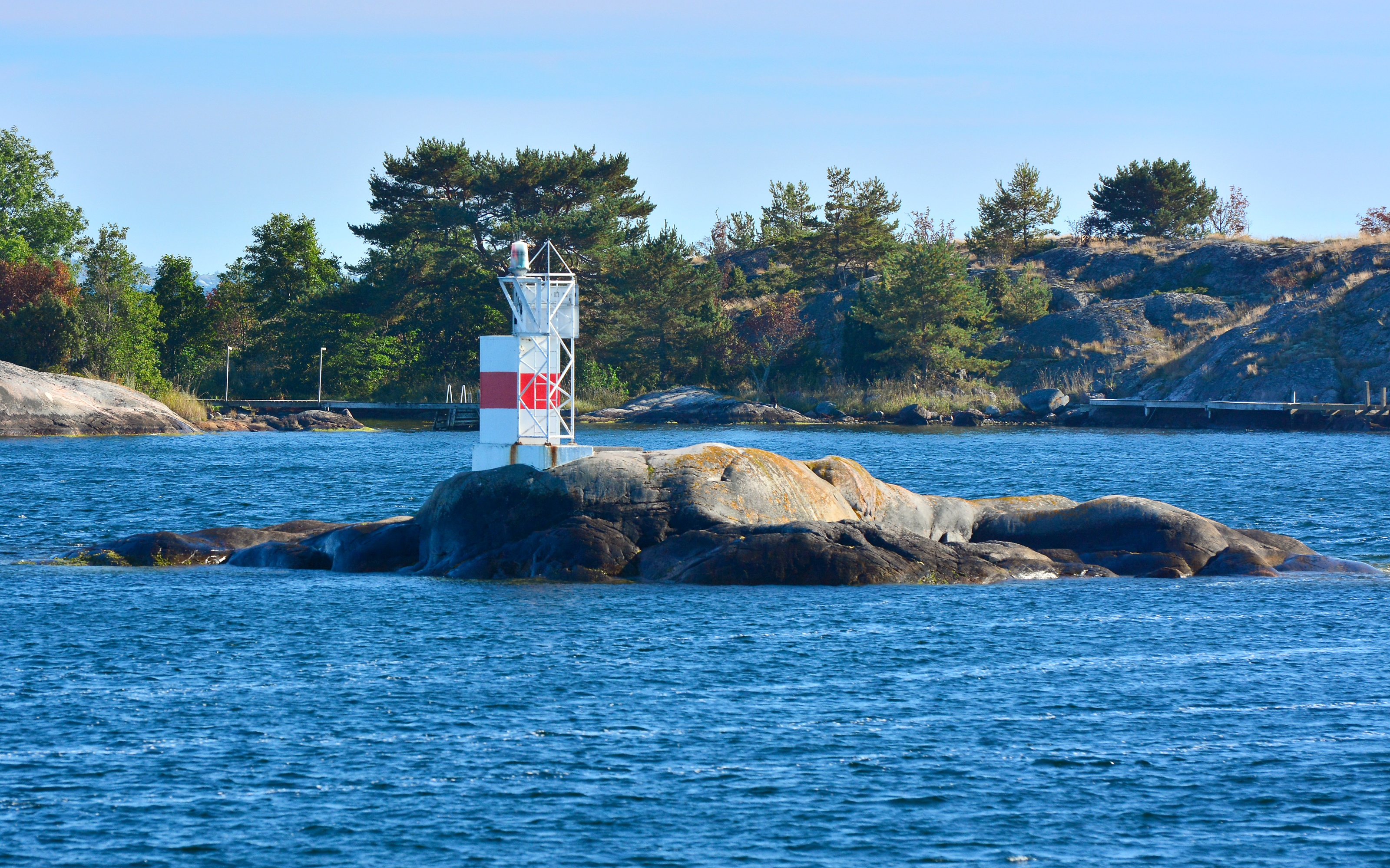 Fyren Farfarsgrund vid Sandhamn i Stockholms skärgård.